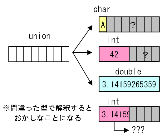 共用体の説明